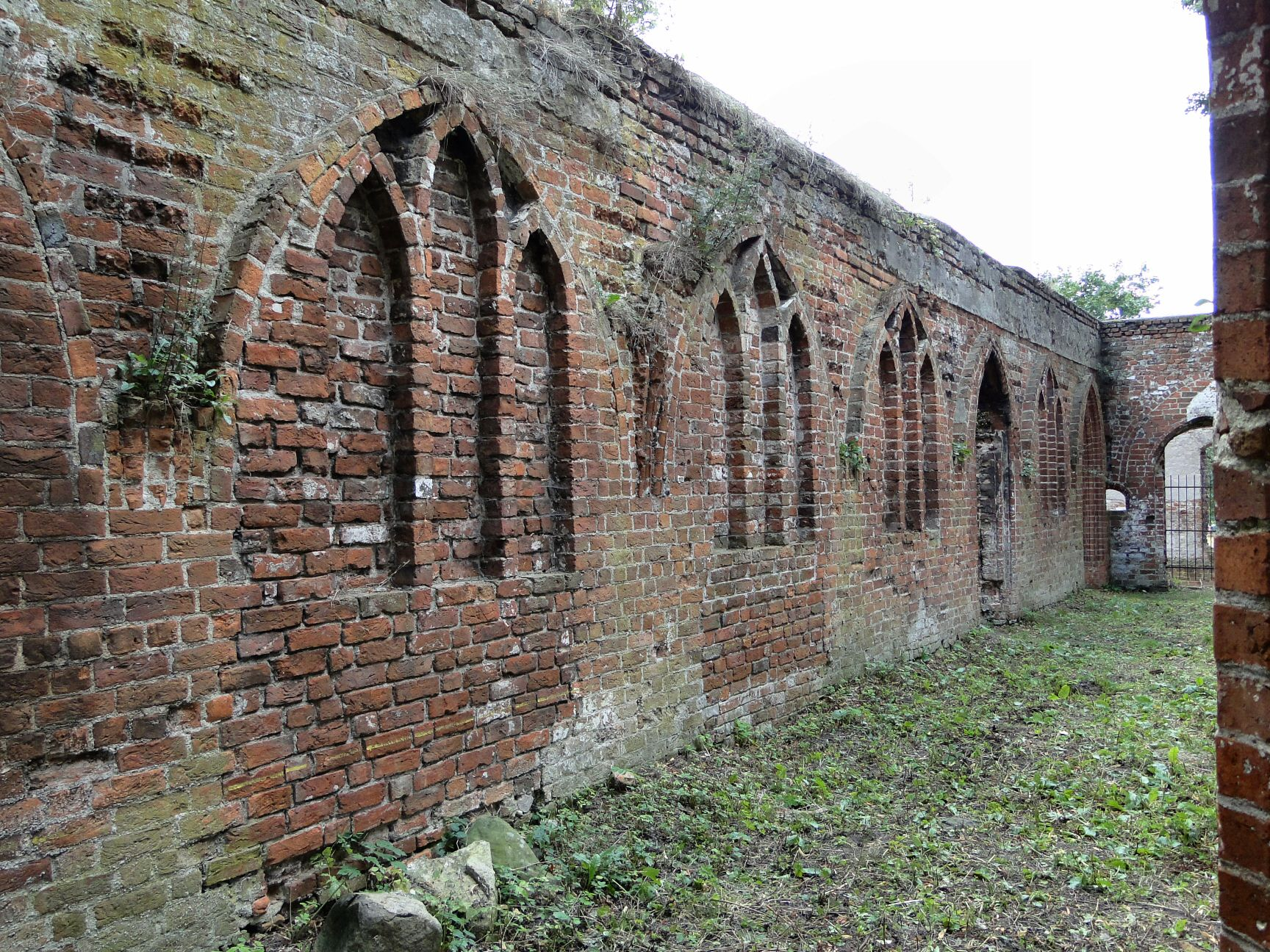 Ruiny klasztoru augustianów w Policach Jasienicy